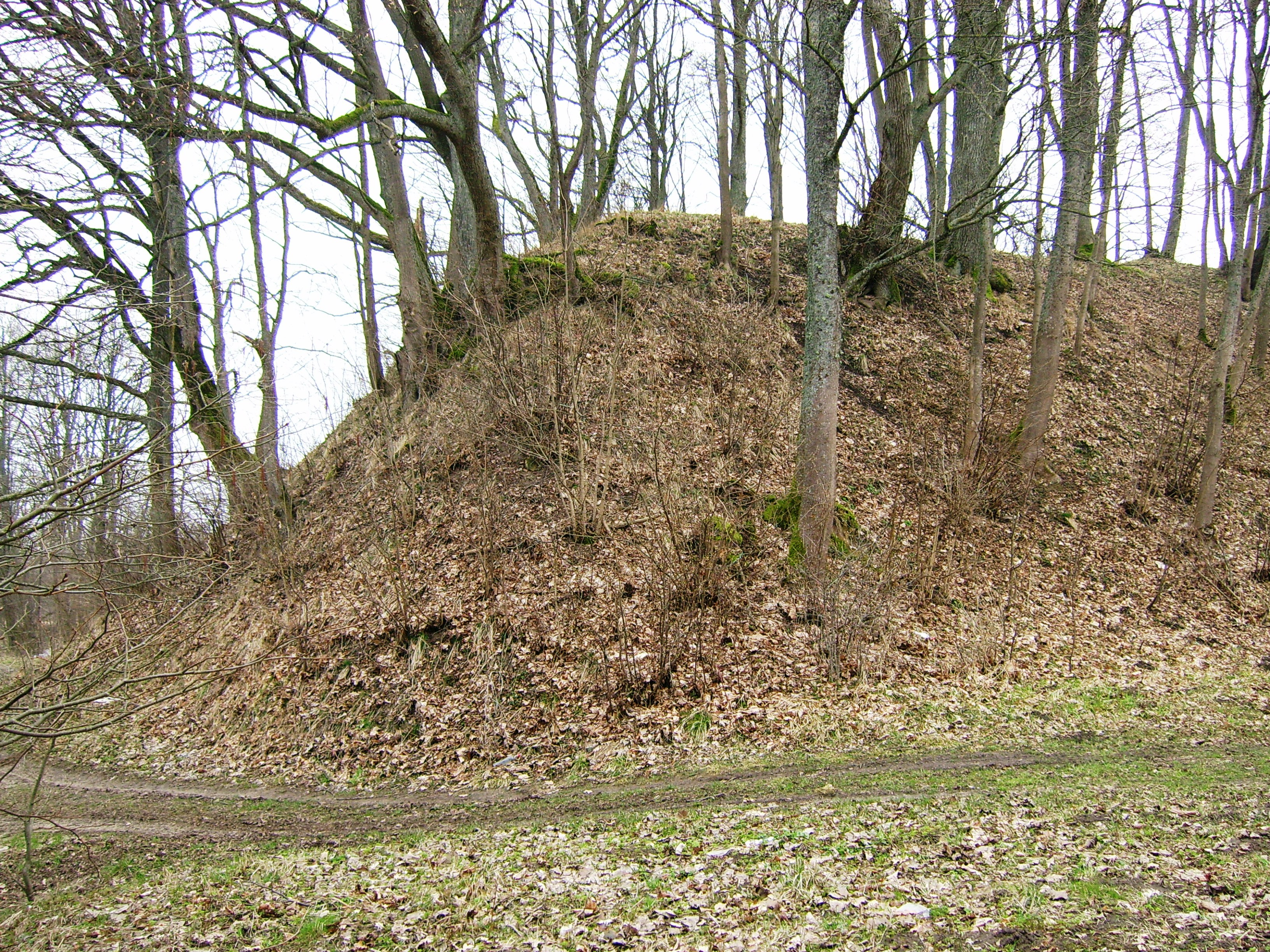 Matiškių piliakalnis